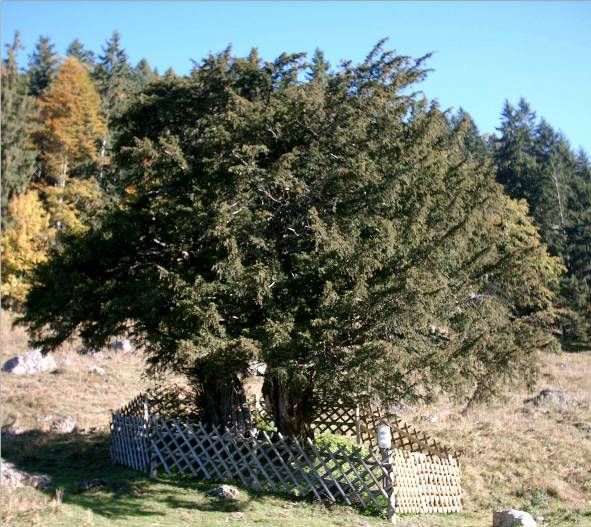 Die Alte Eibe von Balderschwang, von der Talseite her fotografiert.